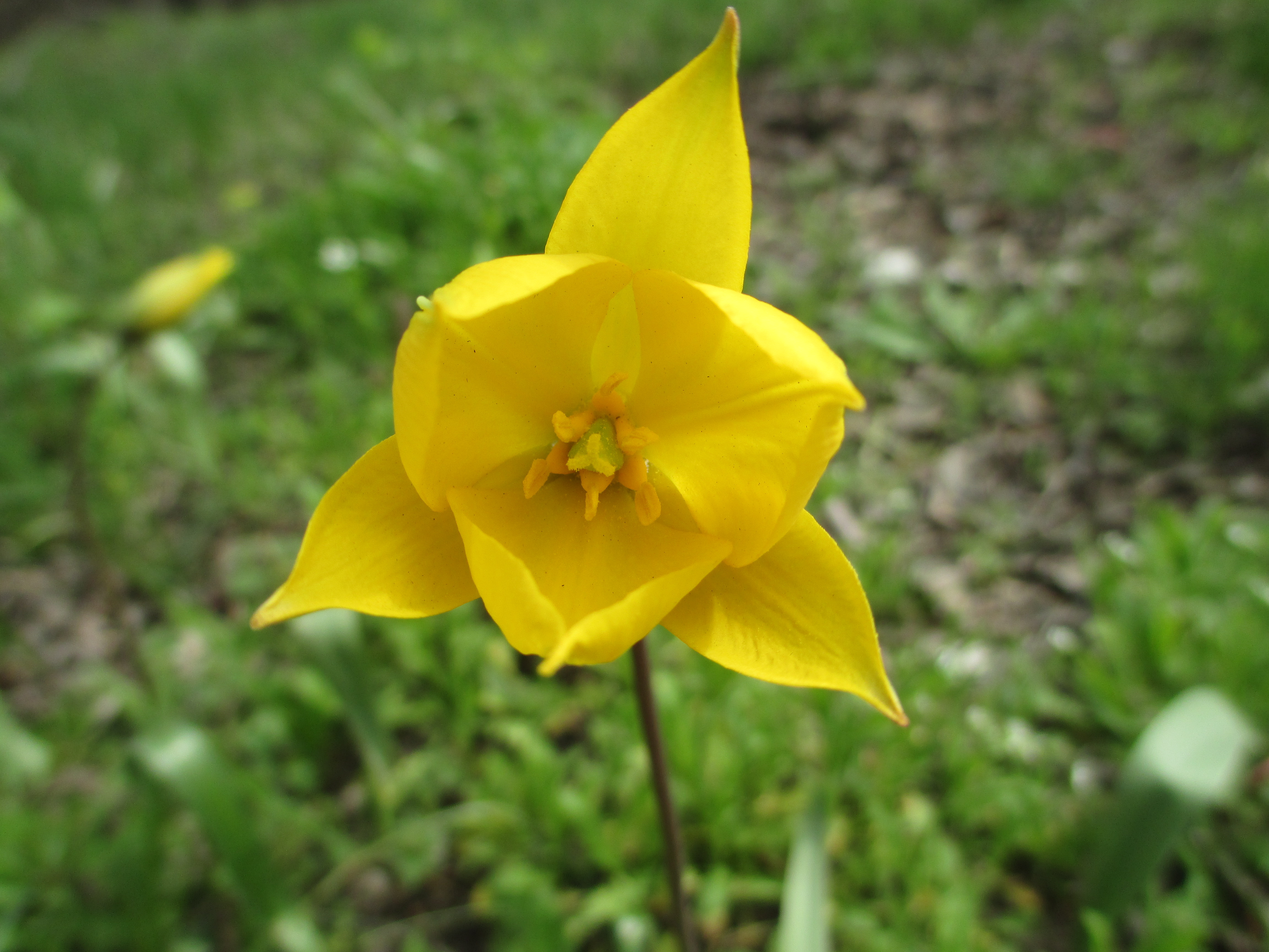 Цветок Тюльпана Биберштейна в Волгоградской области в начале апреля